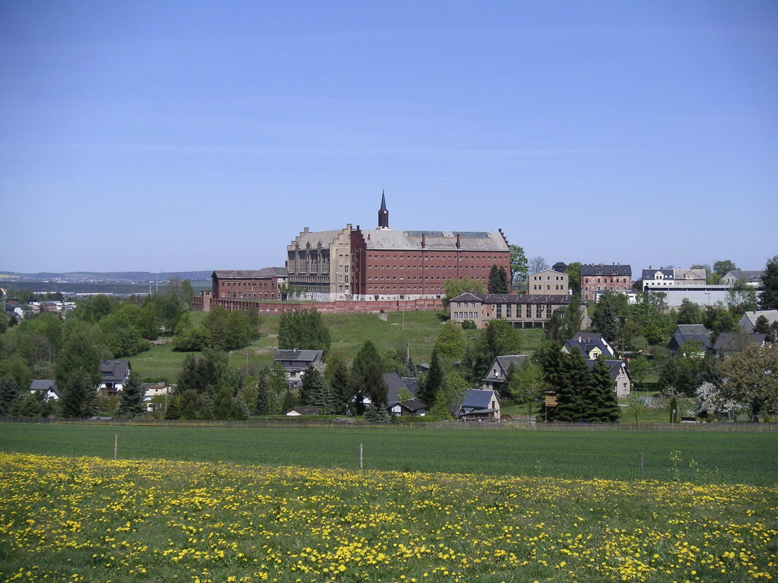 Frauengefängnis Hoheneck in Stollberg/Erzgeb.